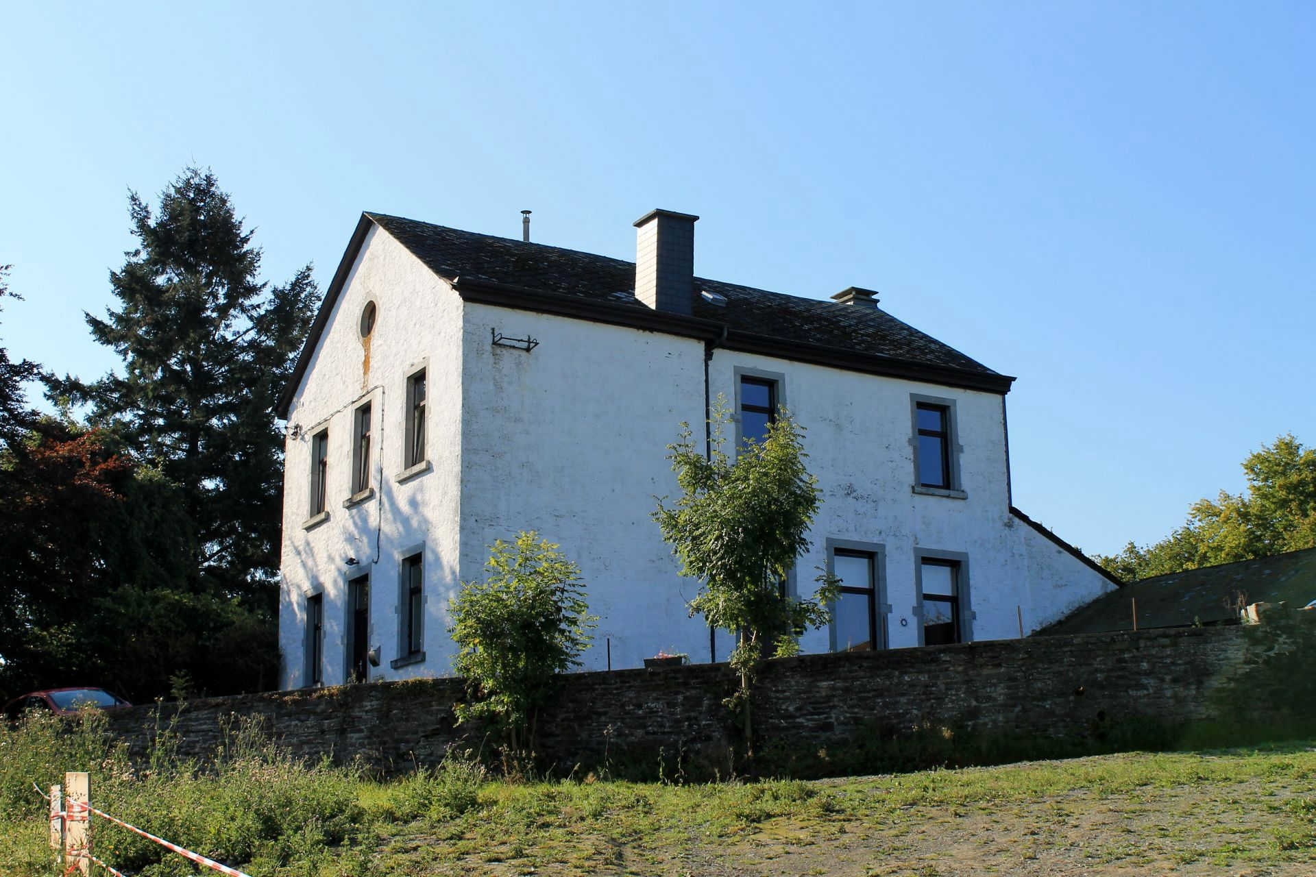 Boeur - School